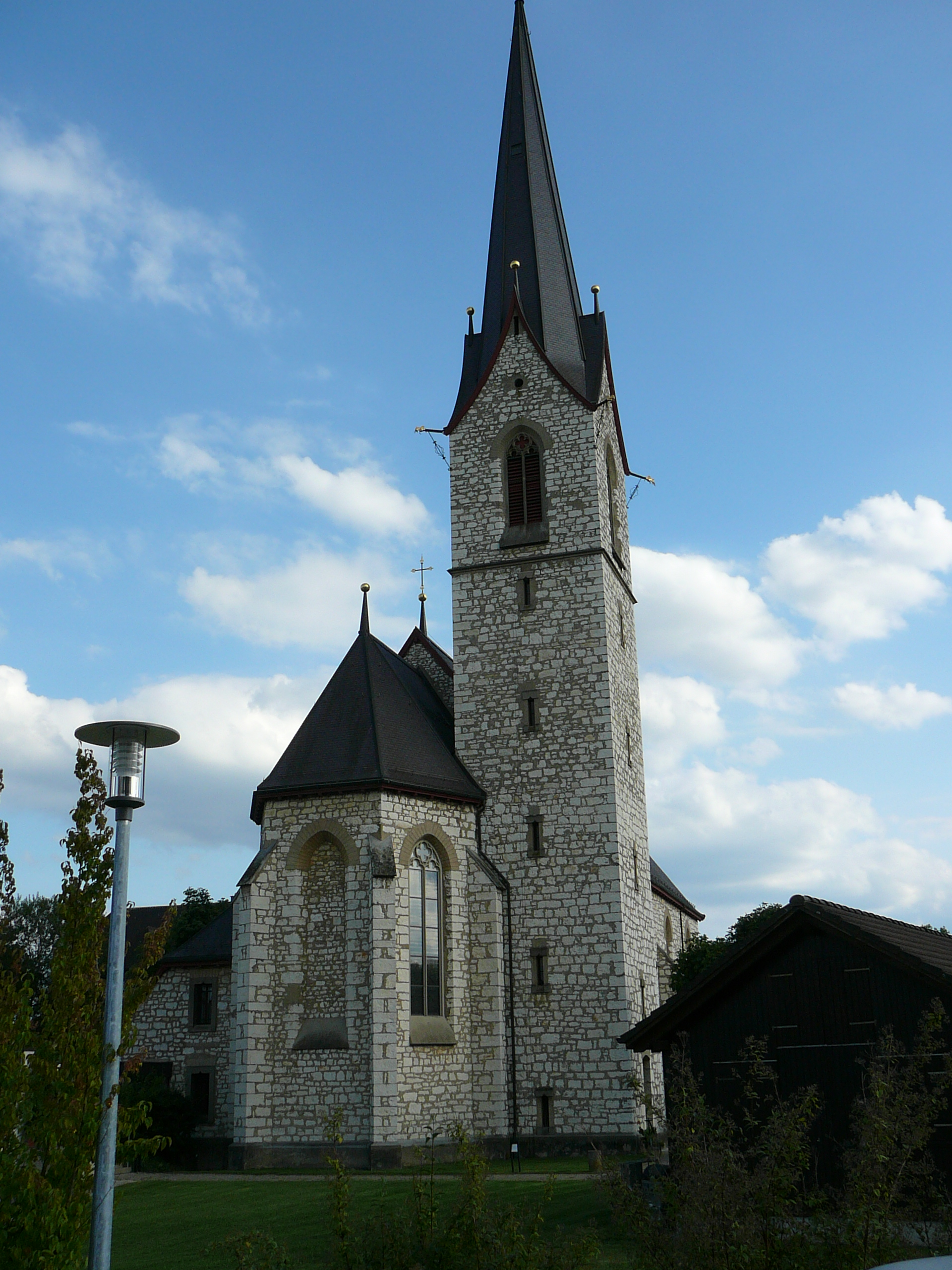 Römisch-katholische Dreifaltigkeitskirche Bülach